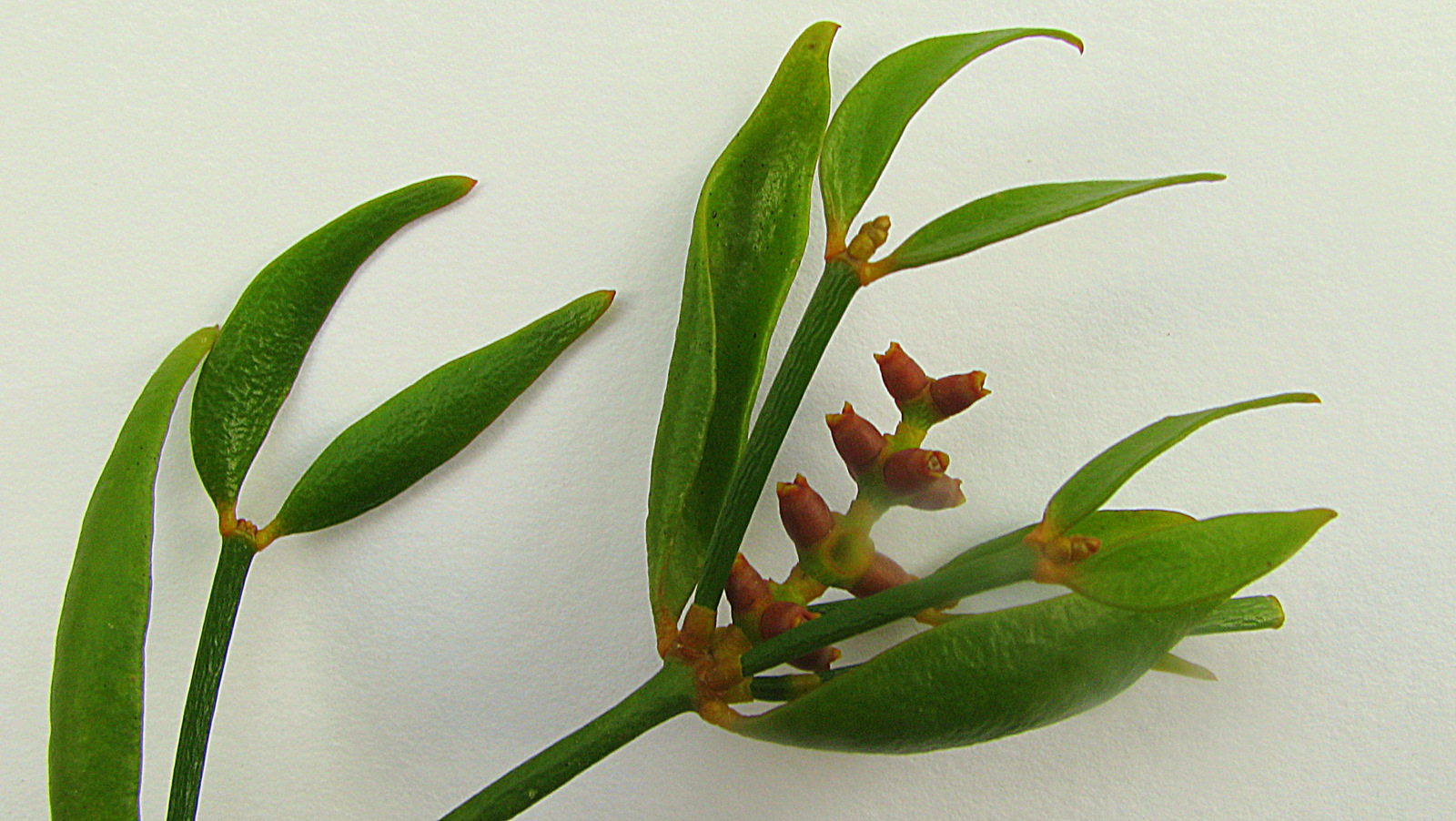 Phoradendron strongyloclados Eichler